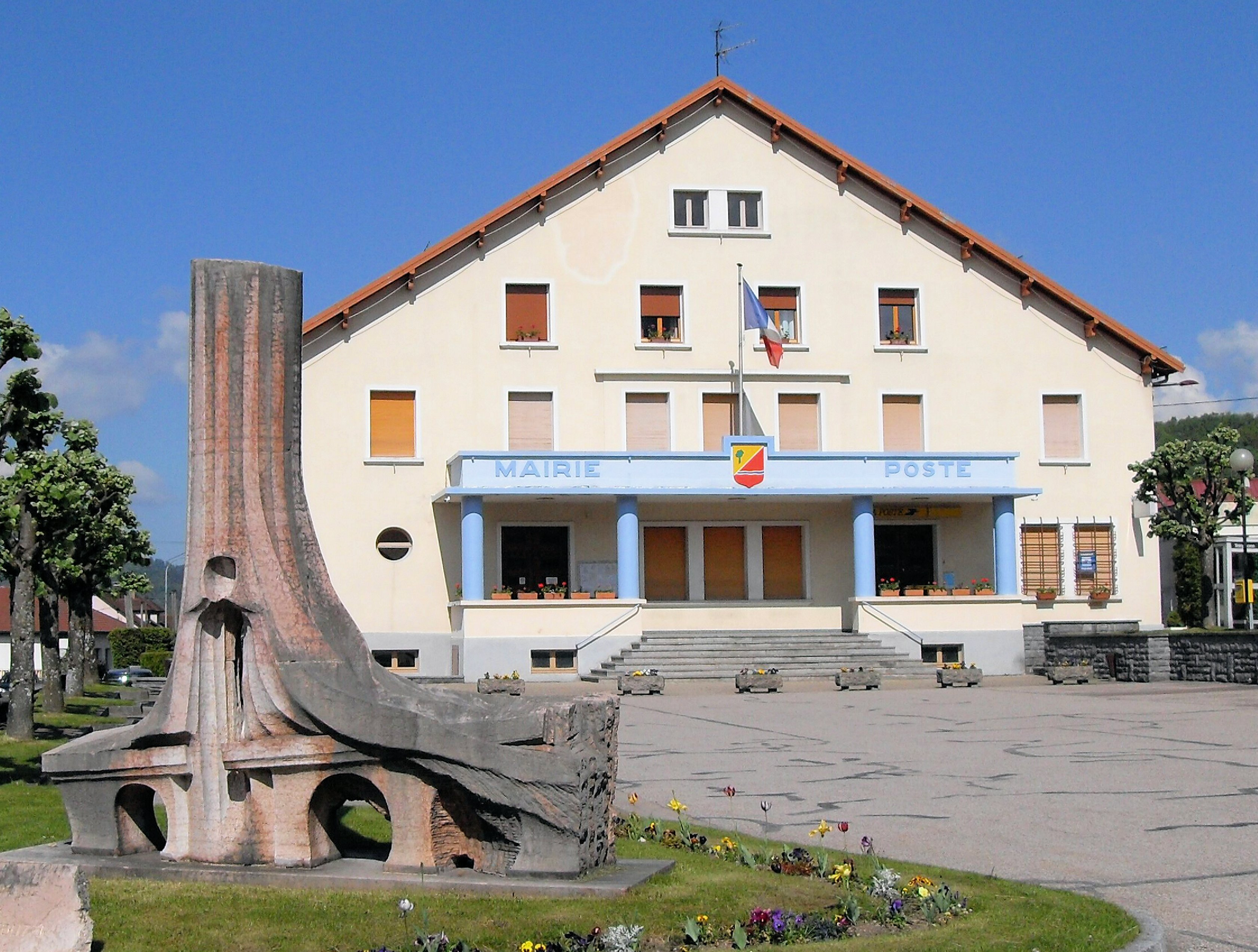 La mairie et la poste de Fresse-sur-Moselle